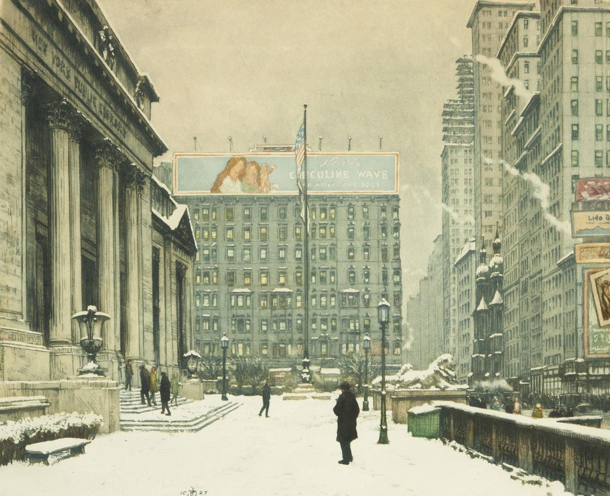 New York Public Library, rechts unten mit Bleistift signiert: T. F. Šimon, links unten mit Autorenstempel bezeichnet und mit Bleistift nummeriert: 128, Radierung und Aquatinta/Papier, 35,5 x 43 cm